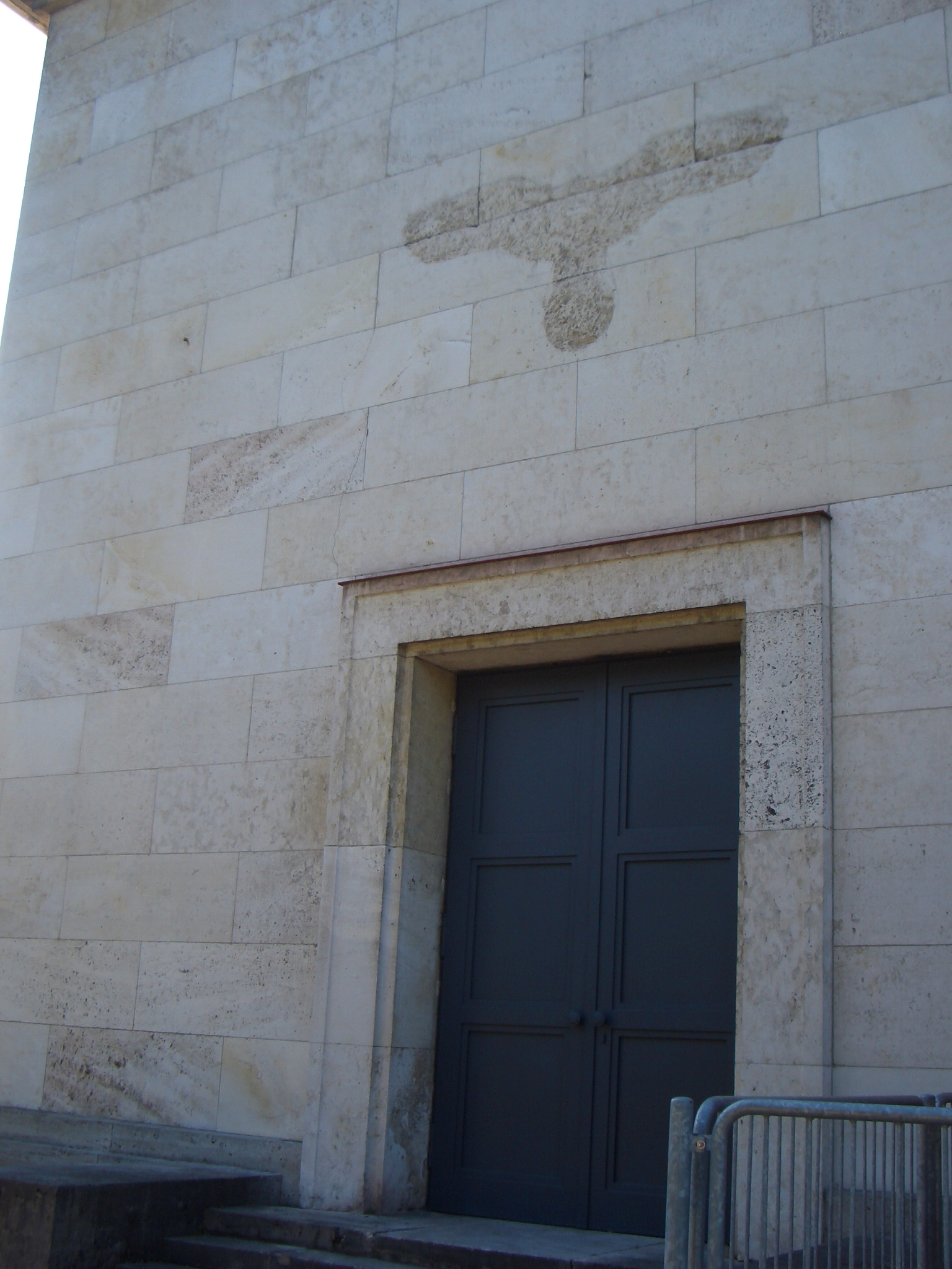 Здание электроподстанции на территории съездов НСДАП